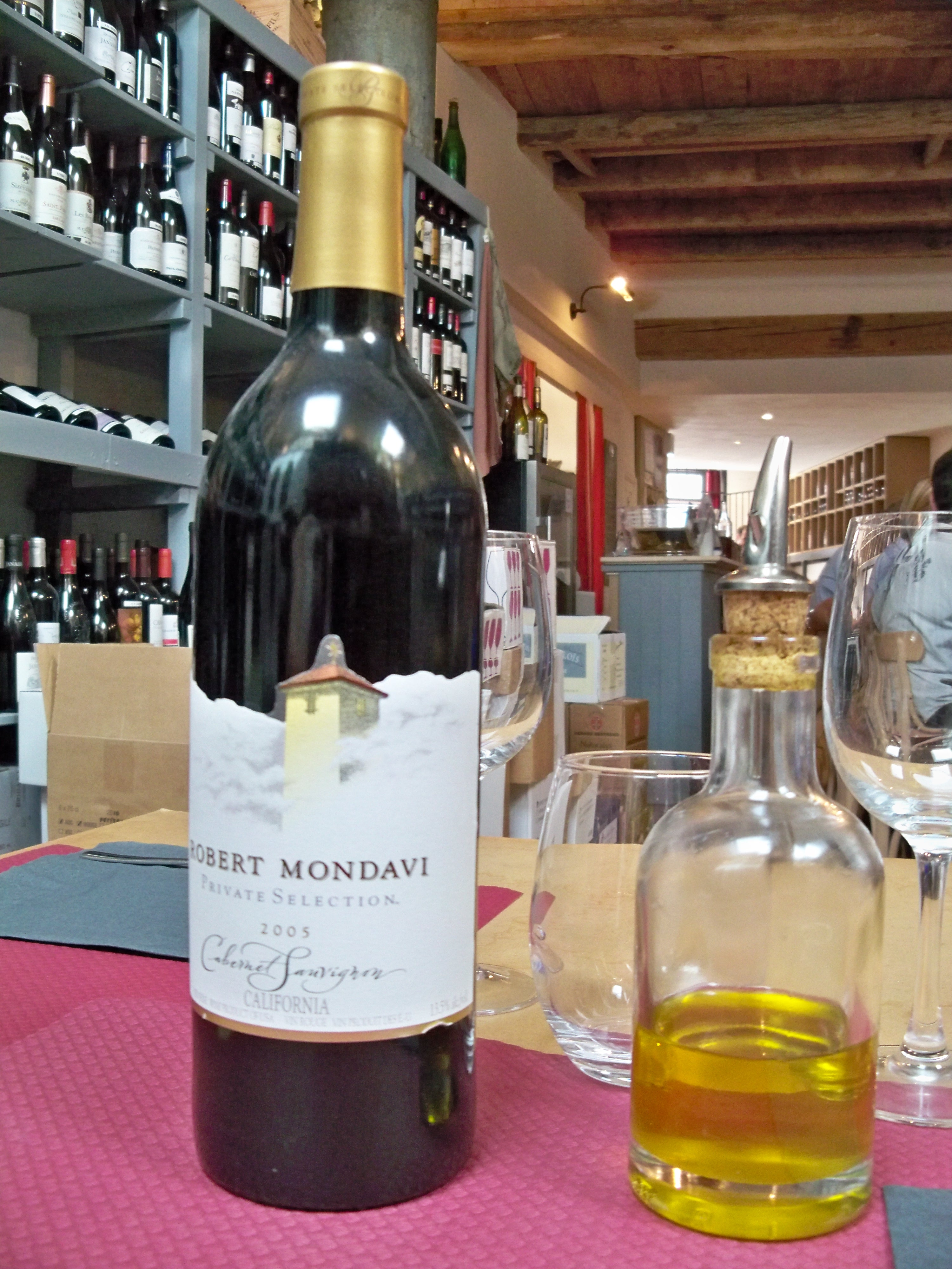 Bouteille de vin de Californie